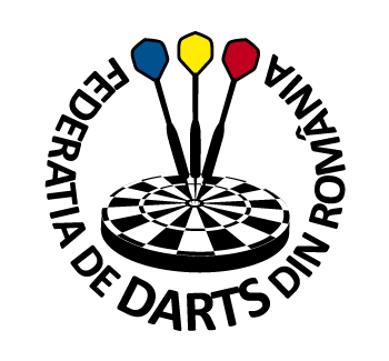 Federatia de Darts din Romania